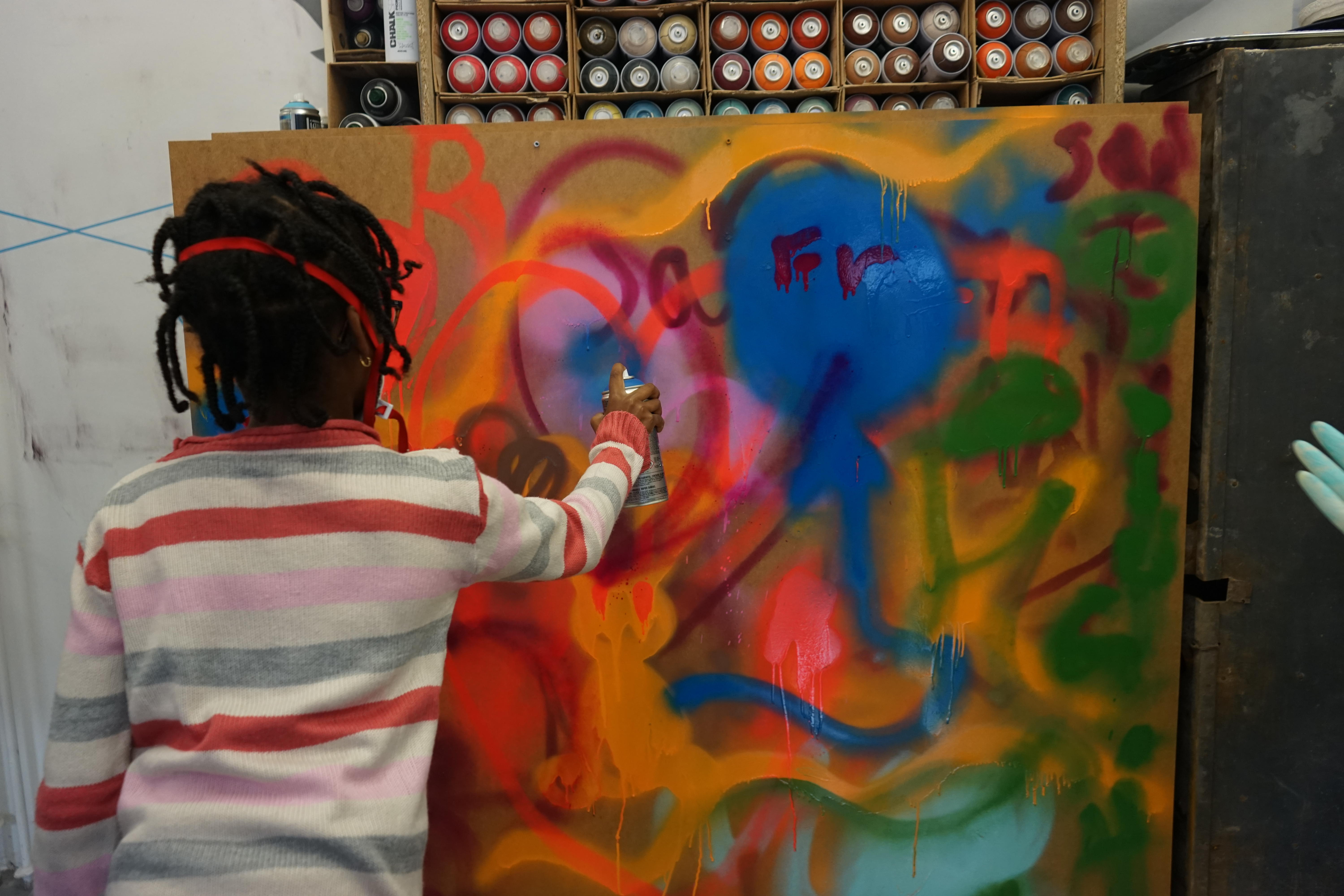 Graffiti sprühen